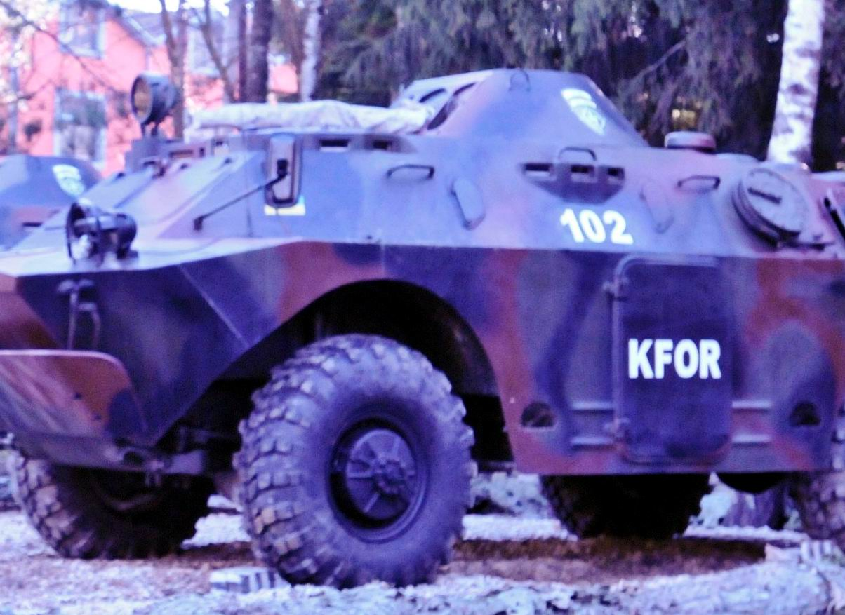 BRDM-2, KFOR, 2011.